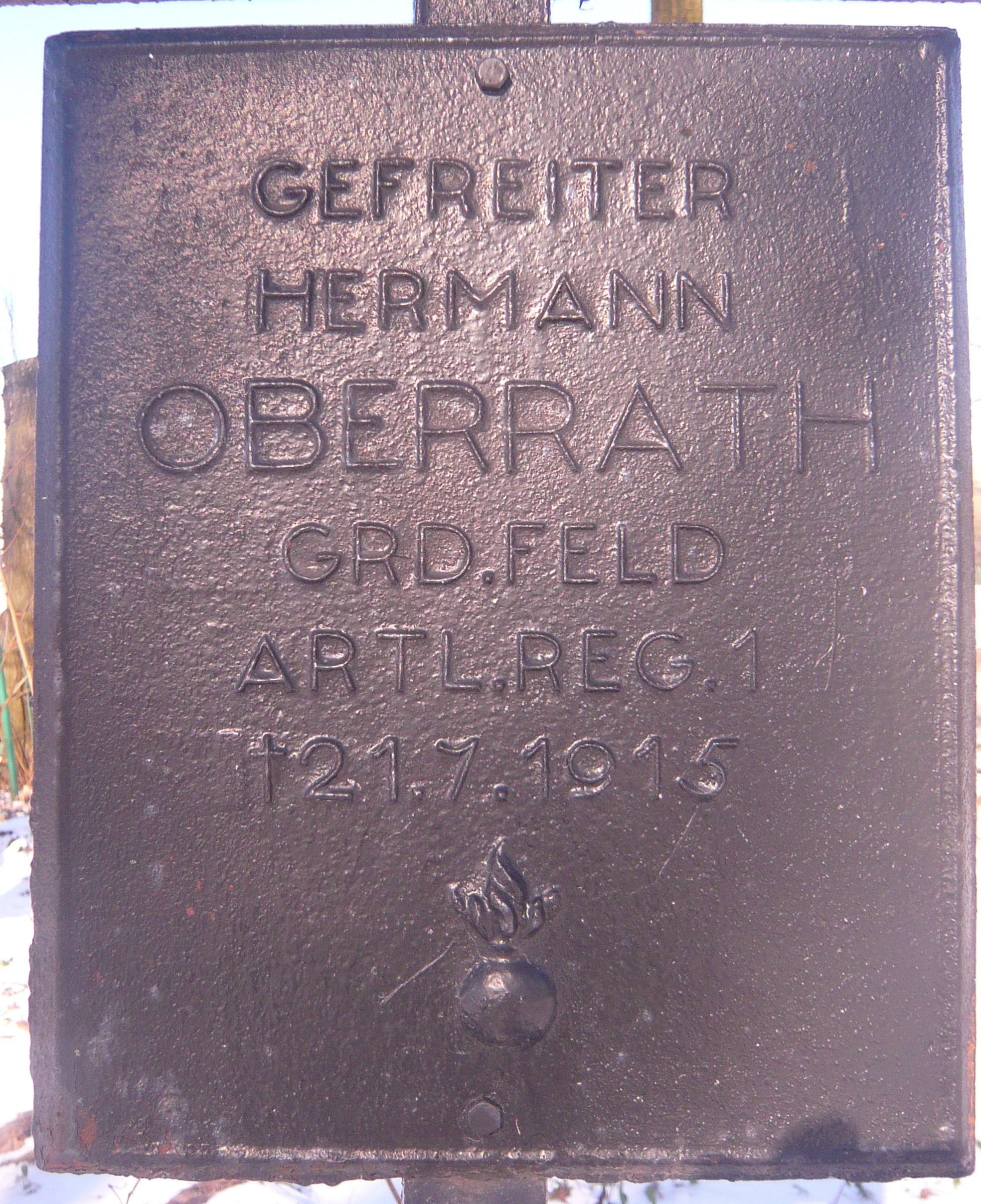 Cmentarz wojenny Rybczewice